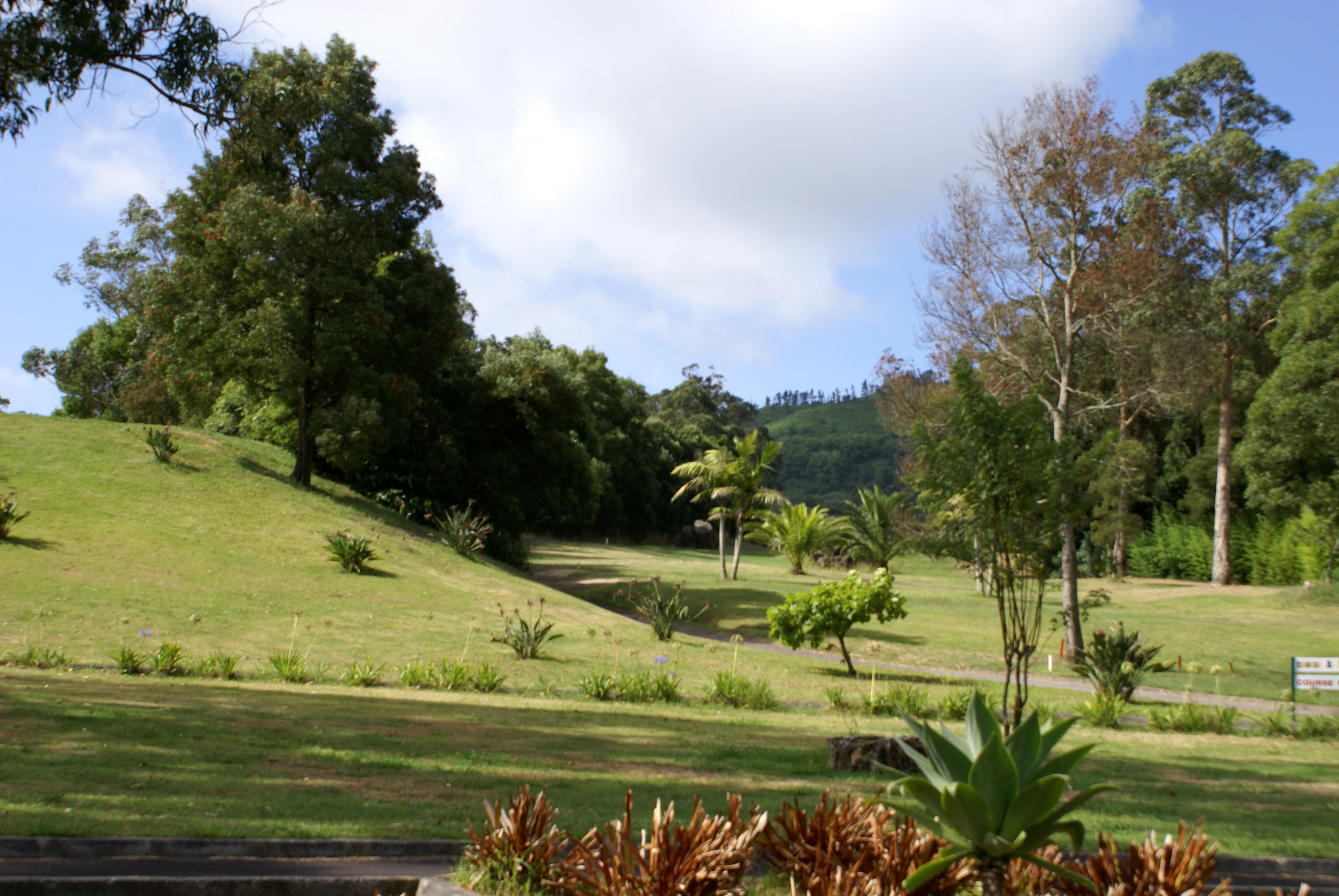 Campo de Golfe da Batalha, Fenais da Luz, Ponta Delgada, ilha de São Miguel, Açores